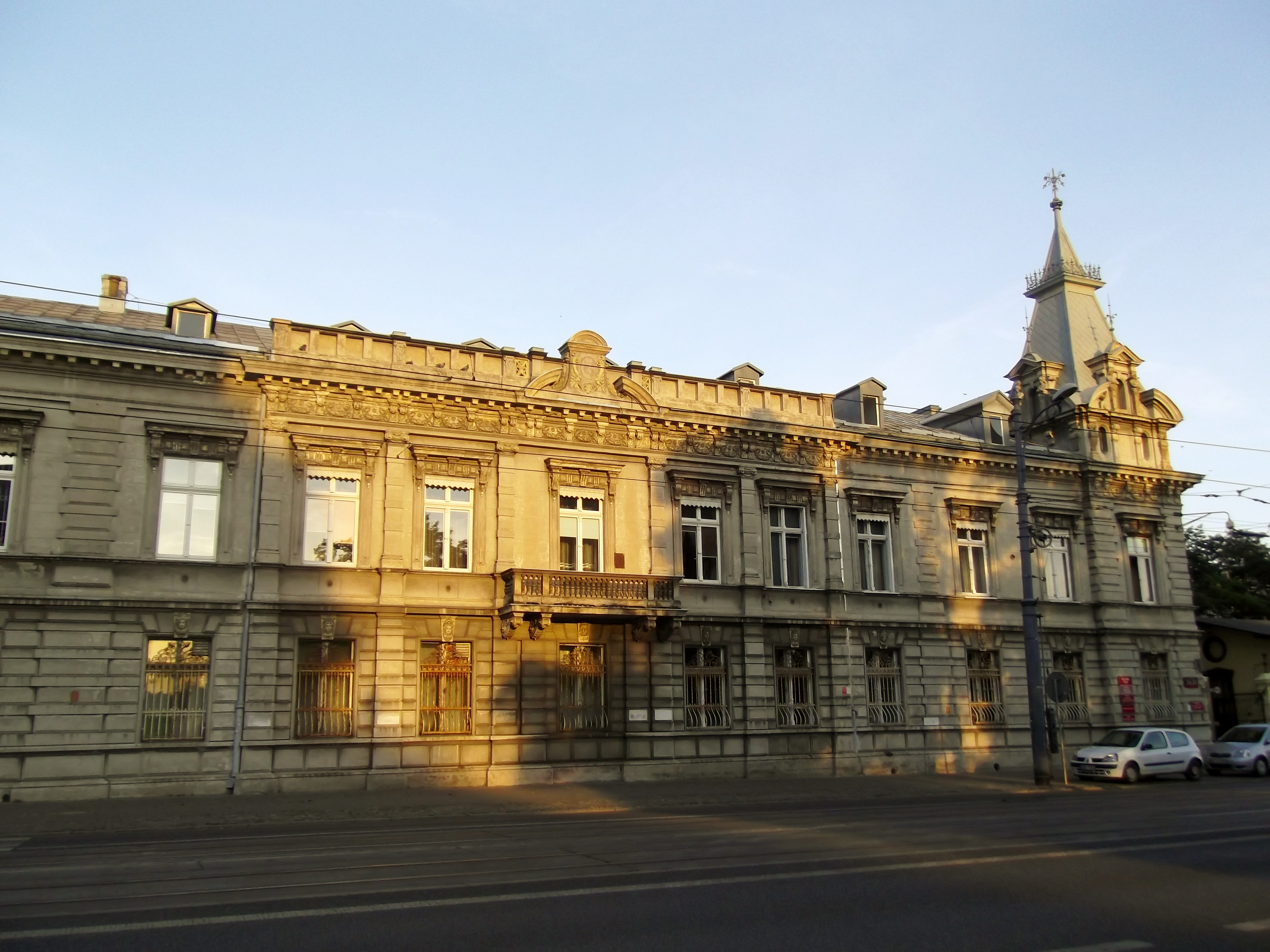 Łódź, pałac Karola W. Scheiblera, 1853, 1894